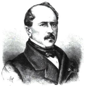 "Le Général Le Pays de Bourjolly, sénateur. D'après une photographie de MM. Bousseton et Appert."